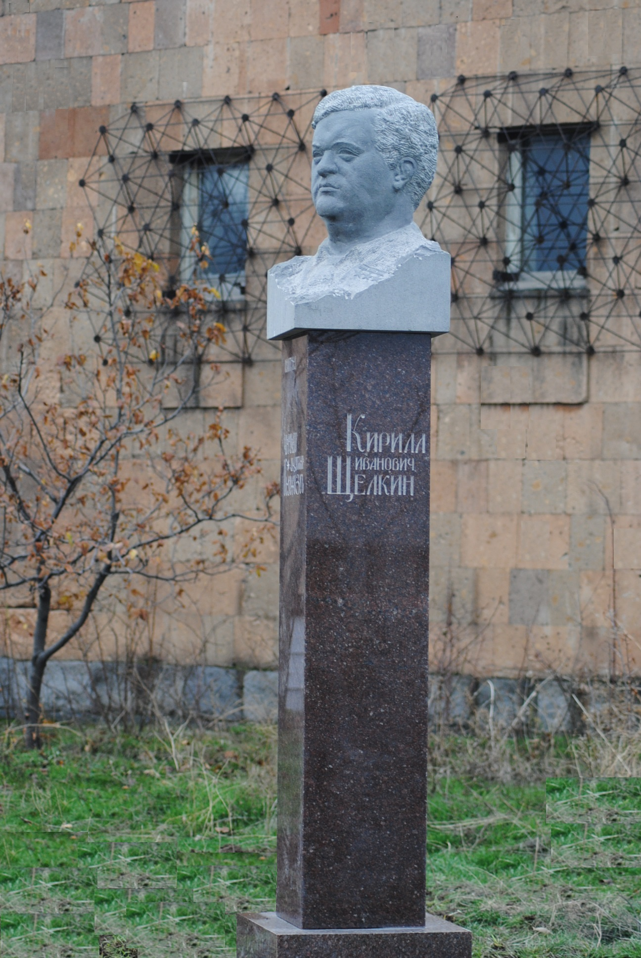 Памятник Щелкину К.И. в Ереване